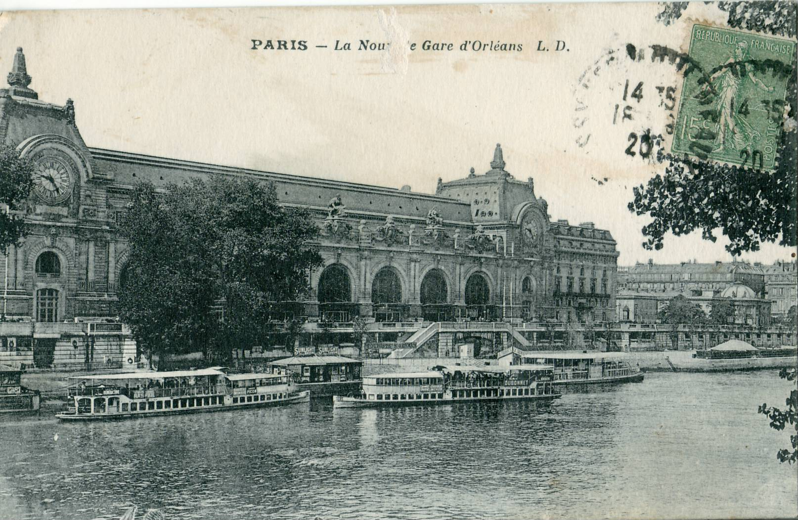 Carte postale ancienne éditée par LD Paris - La nouvelle gare d'OrléansGare d'Orsay et navette fluviale des Bateaux Parisiens